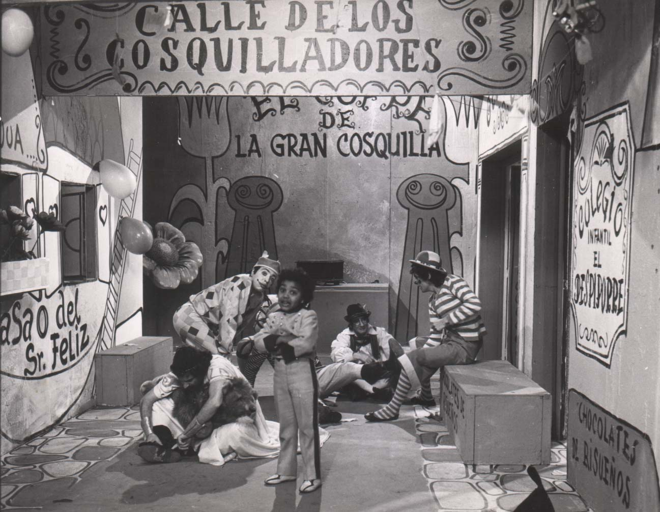 Barullo con sus compañeros Chiripitifláuticos